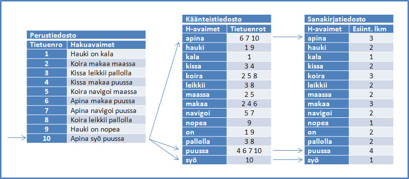 Kuvaaja käänteistiedoston ja sanakirjatiedoston päivityksestä. Esimerkit ovat keksittyjä.